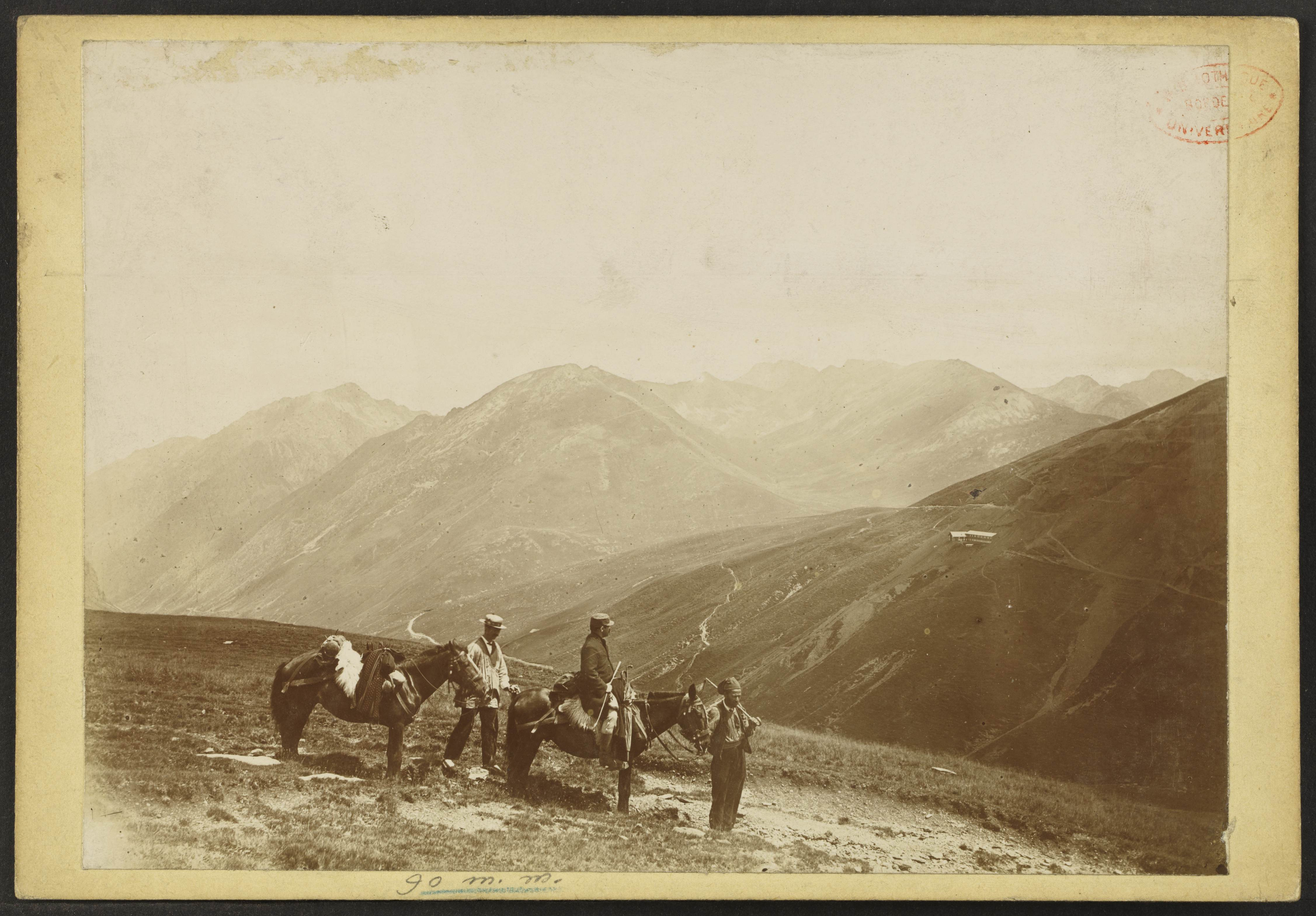 Col de Puymorens